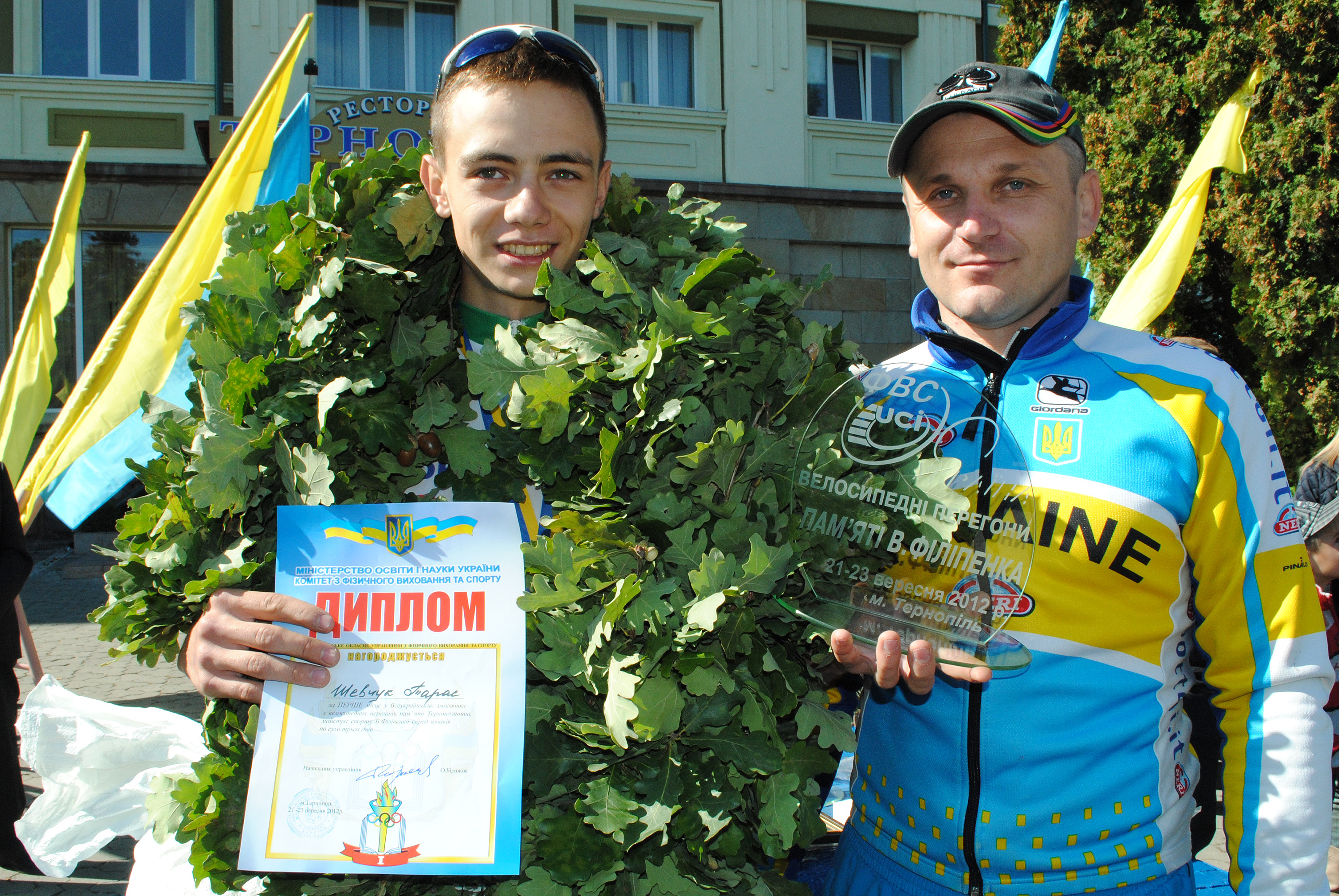 Всеукраїнські велосипедні перегони пам'яті майстра спорту Володимира Філіпенка 21-23 вересня 2012 року в Тернополі. Переможець у групі старших юнаків, учень Тернопільської ЗОШ № 19, майстер спорту Тарас Шевчук (зліва).